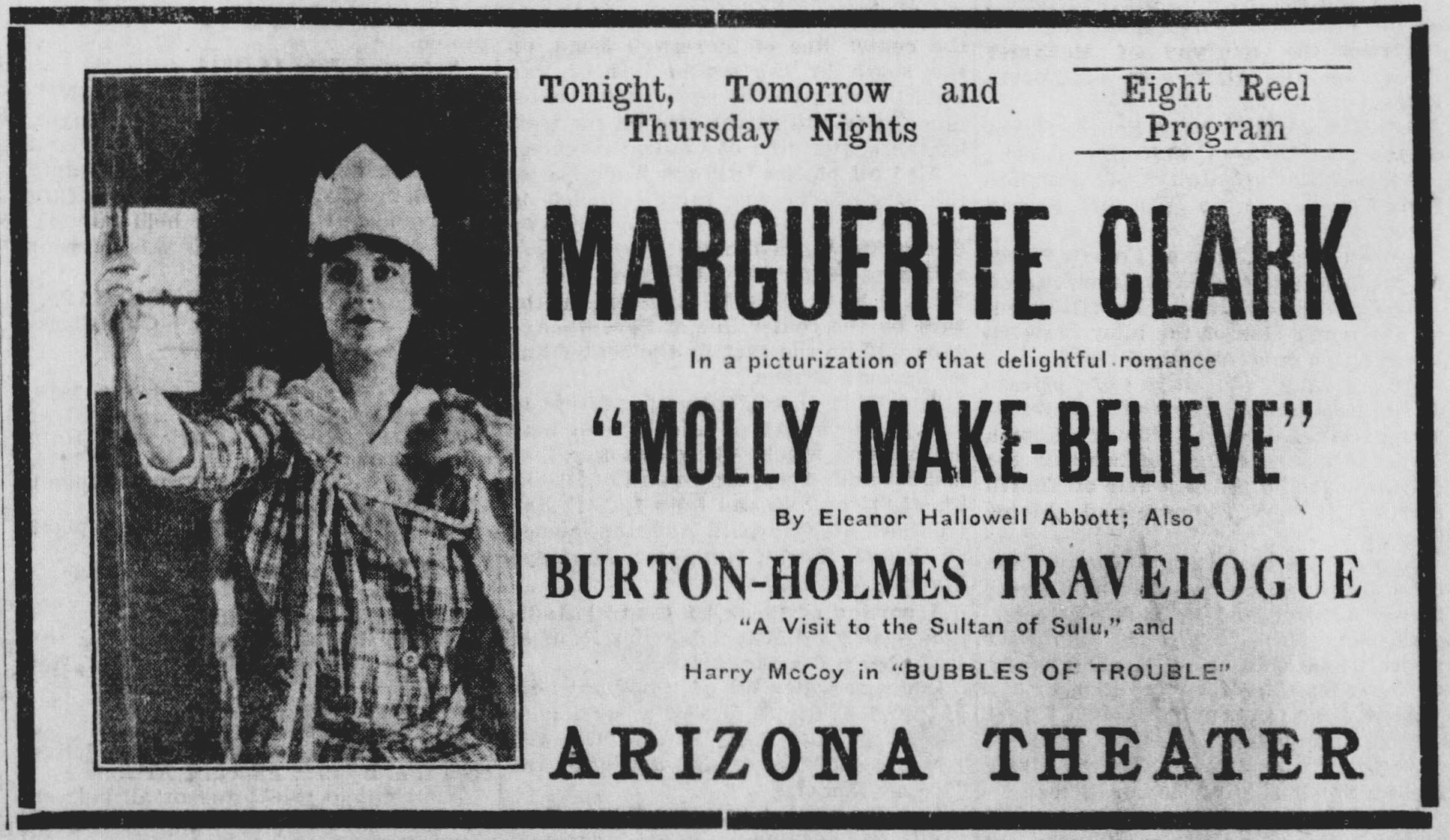 Advertisement for Molly Make-Believe